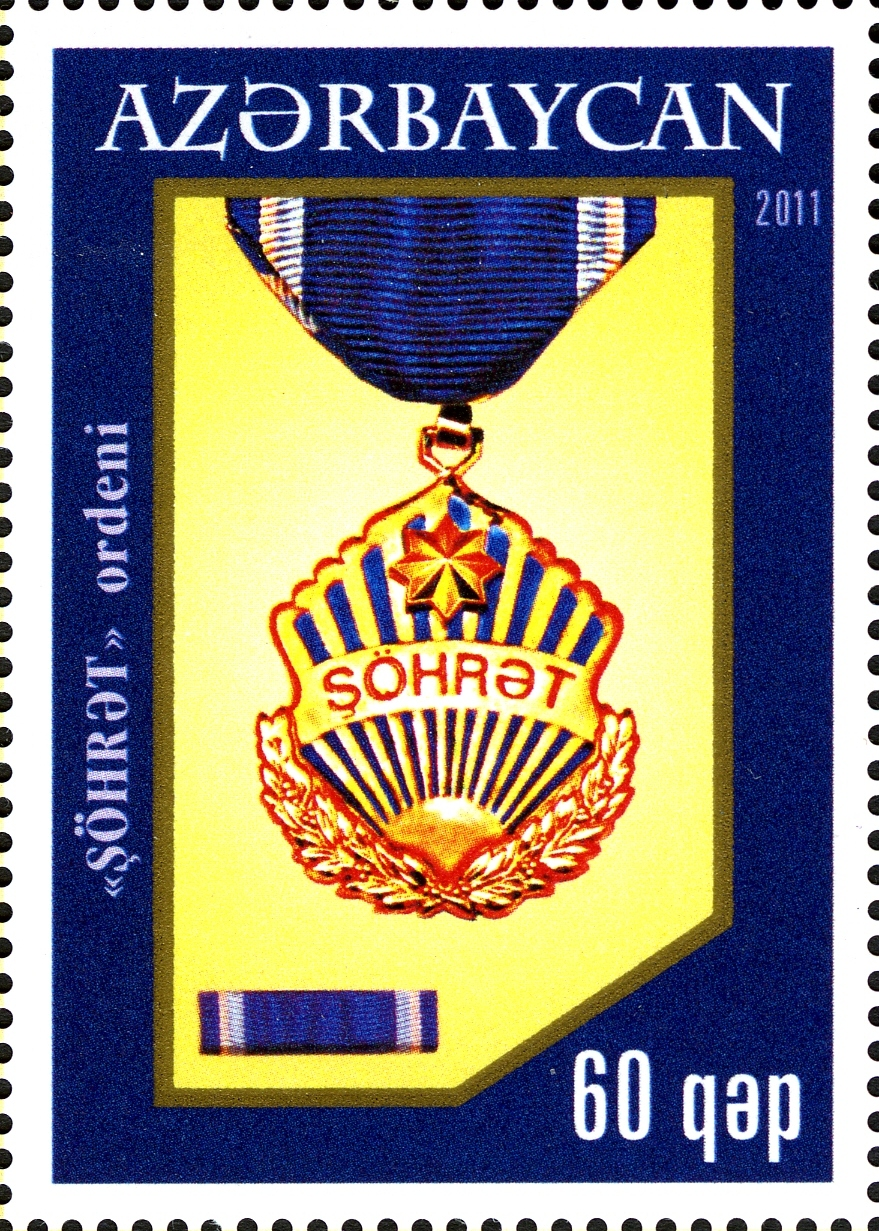 Azərbaycan Respublikasının Ordenləri.